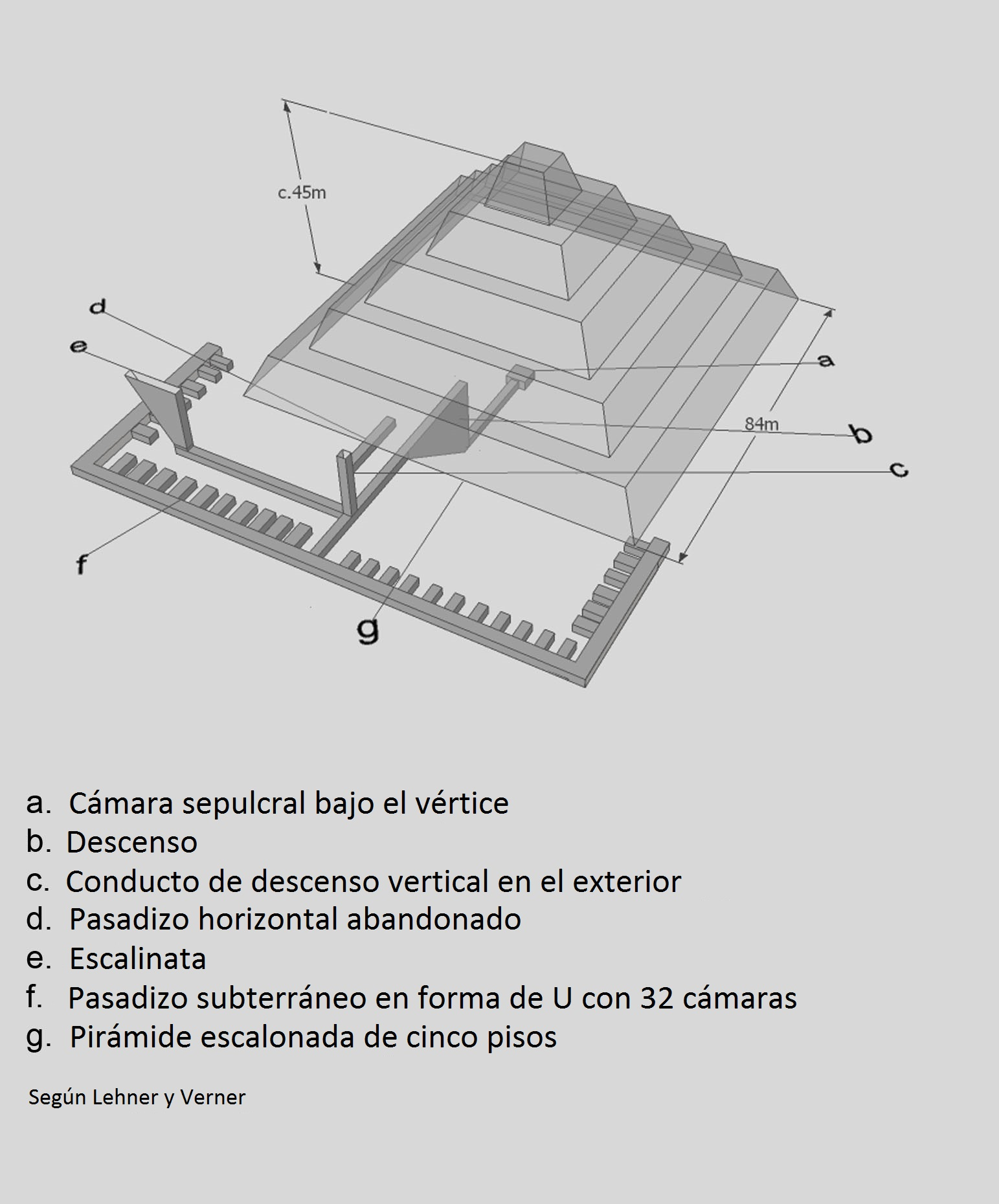 Plano que reconstruye la Pirámide estratificada o de Jaba, según Lehner y Verner.